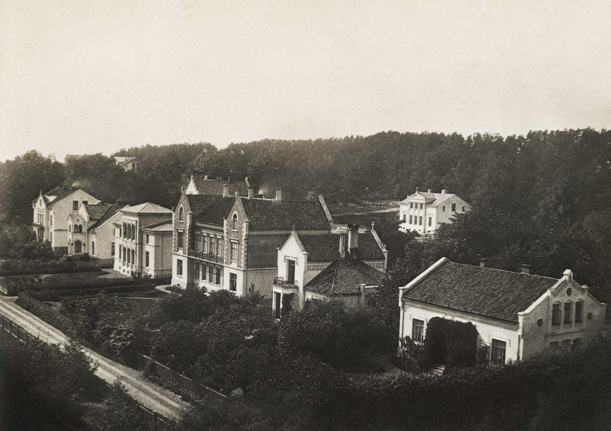 Oscars gate, trolig litt etter 1870. Fra venstre til høyre ses nr. 33A, 31, 29, 27, 25 og 23. Foto: Olaf Martin Peder Væring, fra Byhistorisk samling hos Oslo museum.